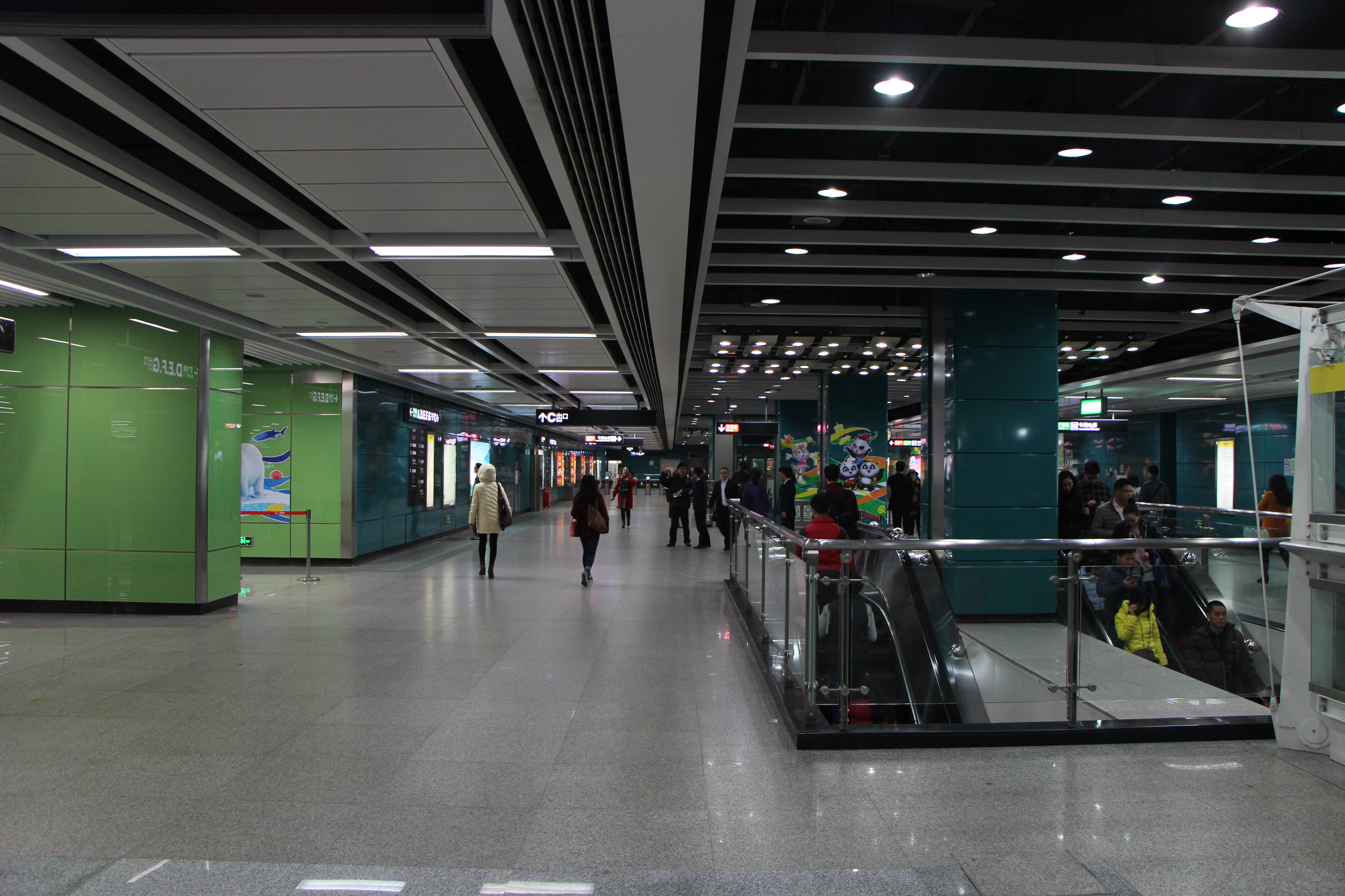 广州地铁汉溪长隆站